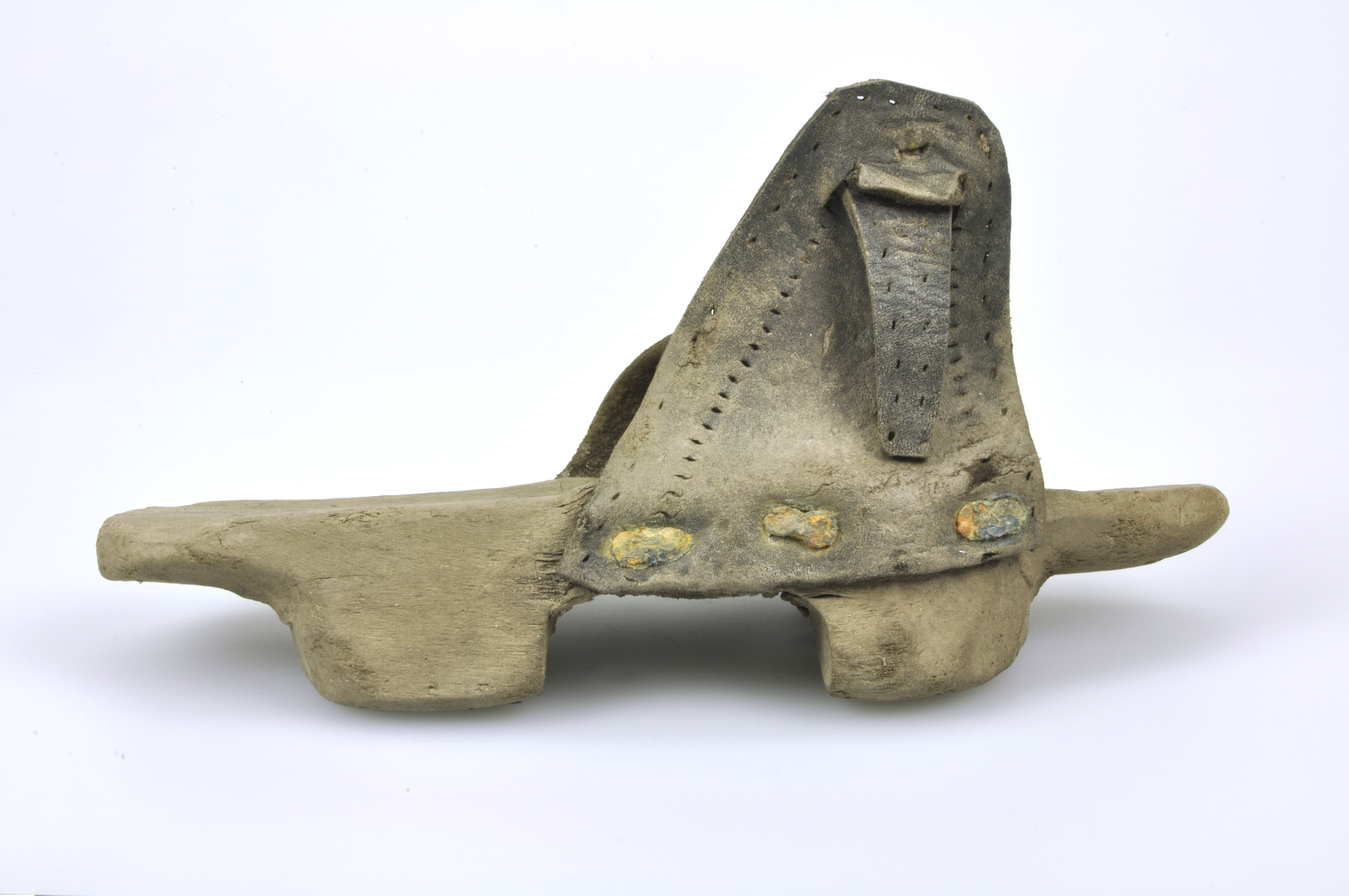 Groenmarkt 8 (2003) Trip, hout/leer/ijzer (1400-1500) het bovenleer bestaat uit twee driehoekige lappen, waarvan de punten met elkaar zijn bevestigd; het bovenleer zit met ijzeren nageltjes vastgeklonken aan de trip. De trip werd gedragen in combinatie met een leren schoen, die onder de wreefband werd geschoven. De schoenen sleten minder snel en waren op deze wijze iets beschermd tegen de modderige onverharde straten. In opdracht van woningbouwvereniging Bouwen en Bewaren werd in augustus en september 2003 een opgraving uitgevoerd op de locatie Groenmarkt 8 te Gorinchem. Van het begin van de 14de tot het eind van de 16de eeuw heeft hier een gasthuis gestaan.